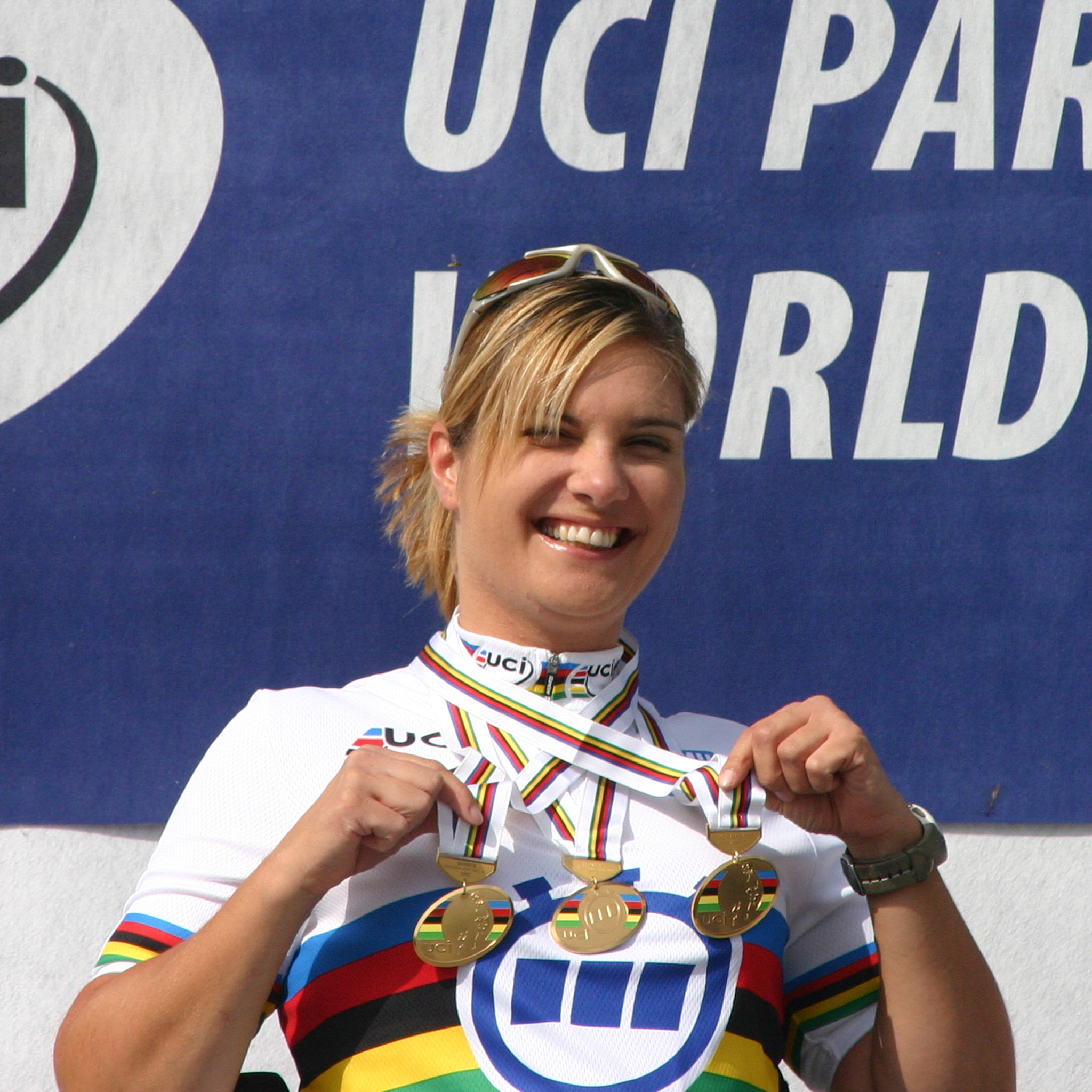 Ursula Schwaller, dreifache Goldmedaillengewinnerin in Bogogno, 2009